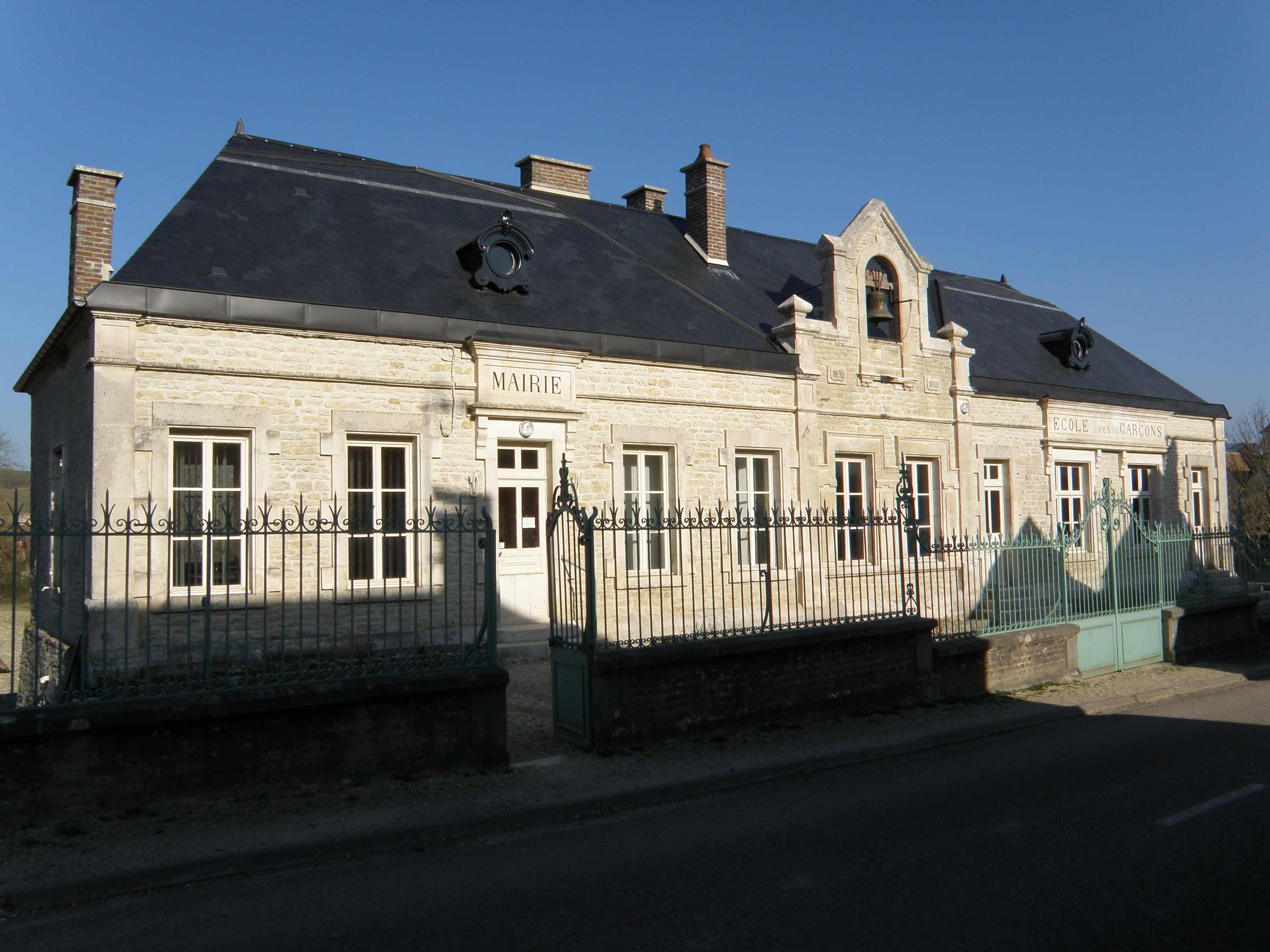 Mairie-Ecole. 10340 Avirey-Lingey